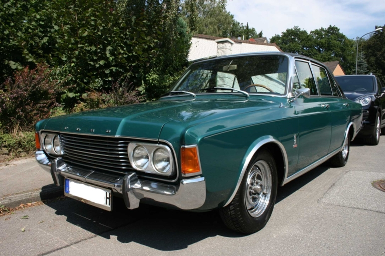 26M in der seltenen Farbkombi grün-schwarz und mit RS Chromfelgen